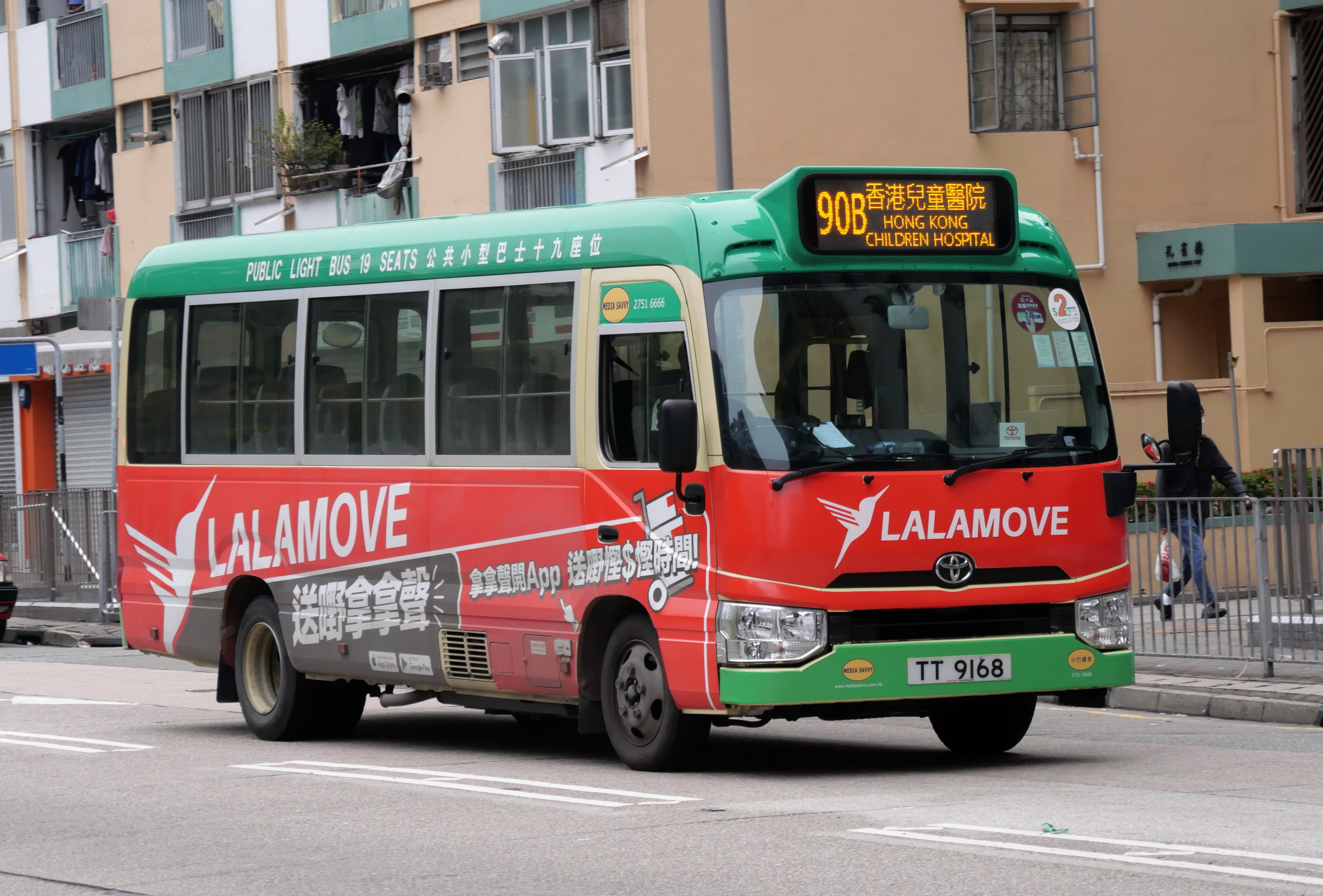 中文（中国大陆）: 小巴TT9168的照片